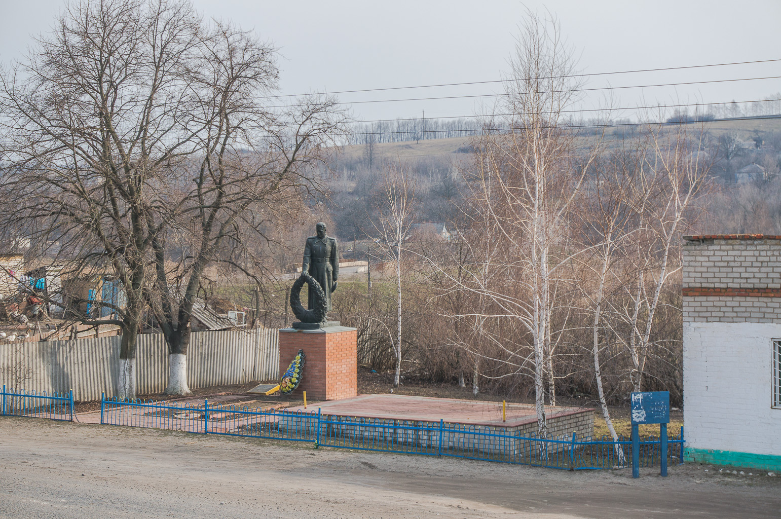 Братська могила радянських воїнів. Поховано 23 воїна., Синиха